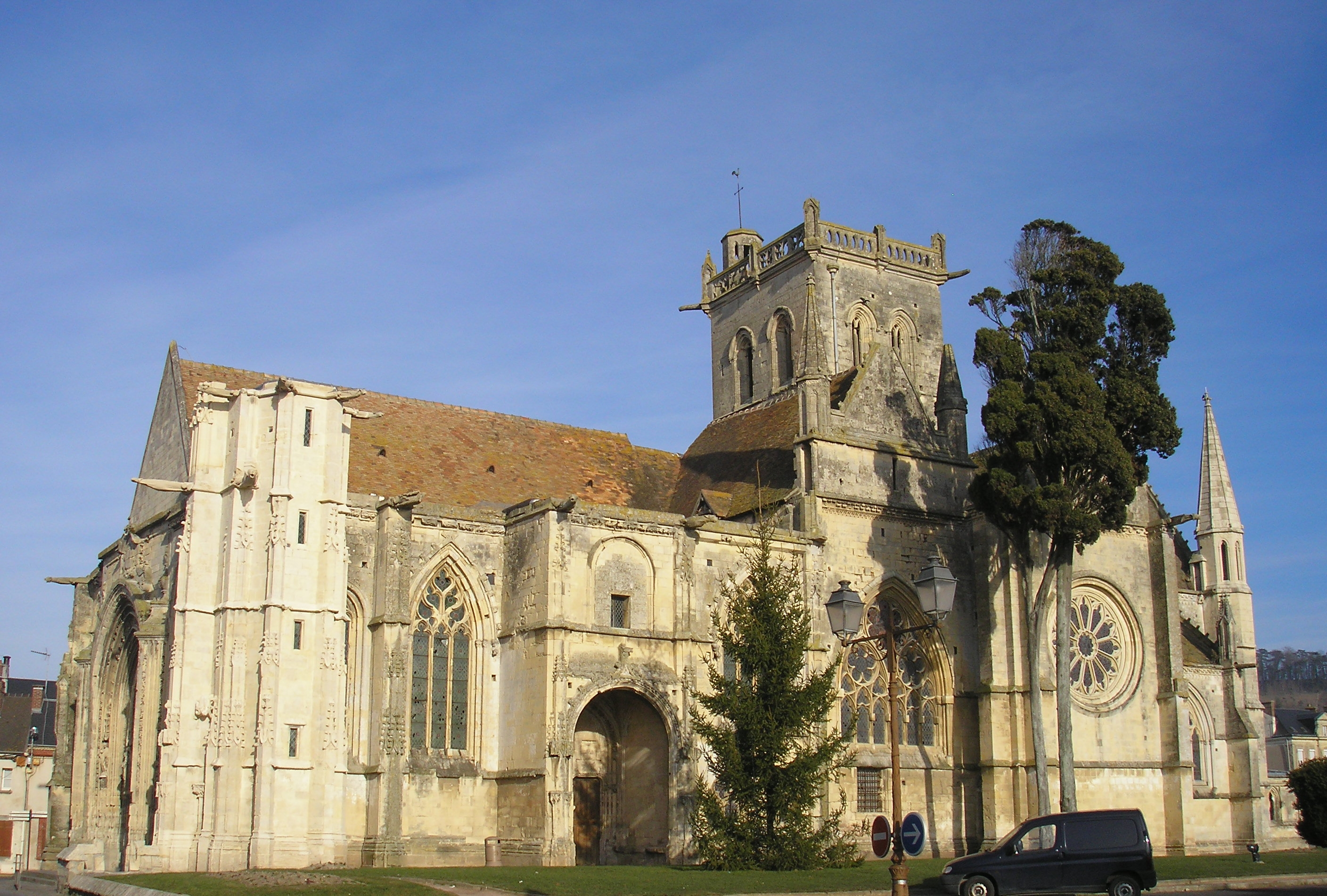 Dives-sur-Mer (Normandie, France). L'église Notre-Dame.